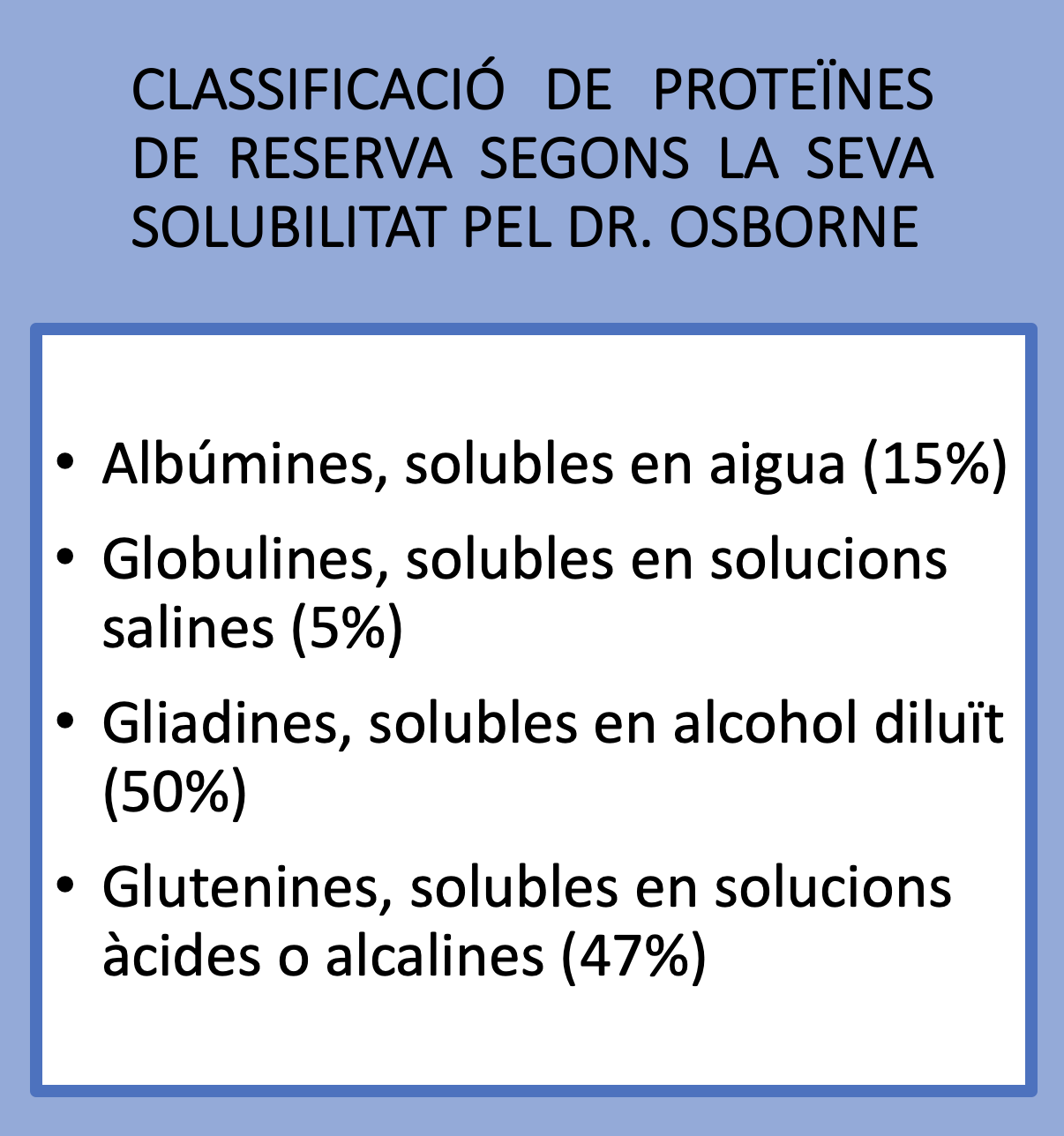 Figura 1. Es mostra la classificació del Dr. Osborne després de dur a terme el seu experiment sobre el gra del blat.